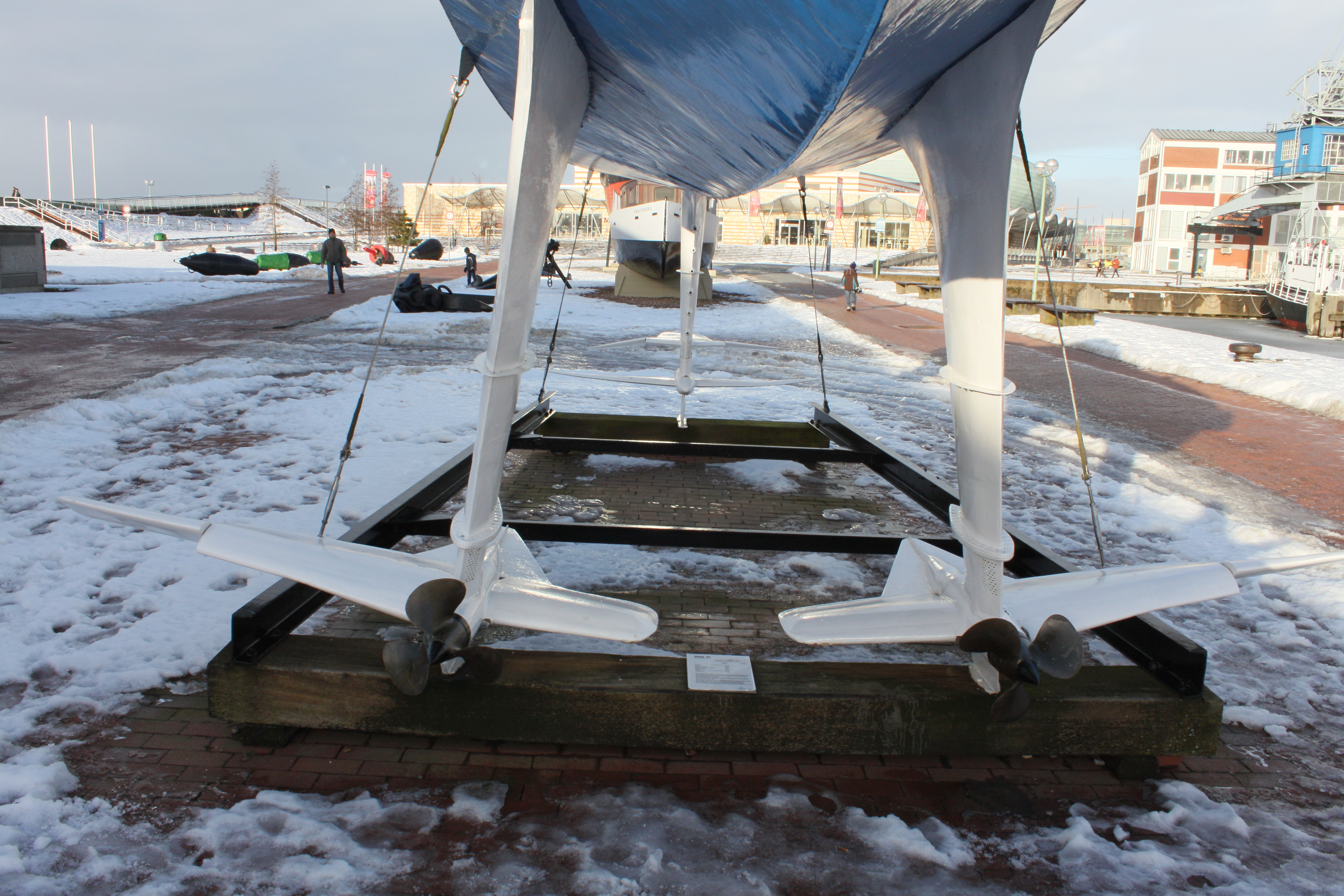 Deutsches Schiffahrtsmuseum - Außenbereich German Maritime Museum Native nameDeutsches SchiffahrtsmuseumLocationHans-Scharoun-Platz 1 27568 Bremerhaven GermanyCoordinates53° 32′ 24″ N, 8° 34′ 37″ E Established5 September 1975WebsiteDeutsches SchiffahrtsmuseumAuthority control : Q455354 VIAF: 128715457 ISNI: 0000 0001 2256 5668 LCCN: n50065866 NLA: 35745010 GND: 2008892-9 SUDOC: 03004622X BNF: 12154219k WorldCat